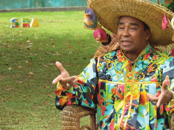 Músico brasileiro Pinduca em imagem do acervo da TV Brasil.